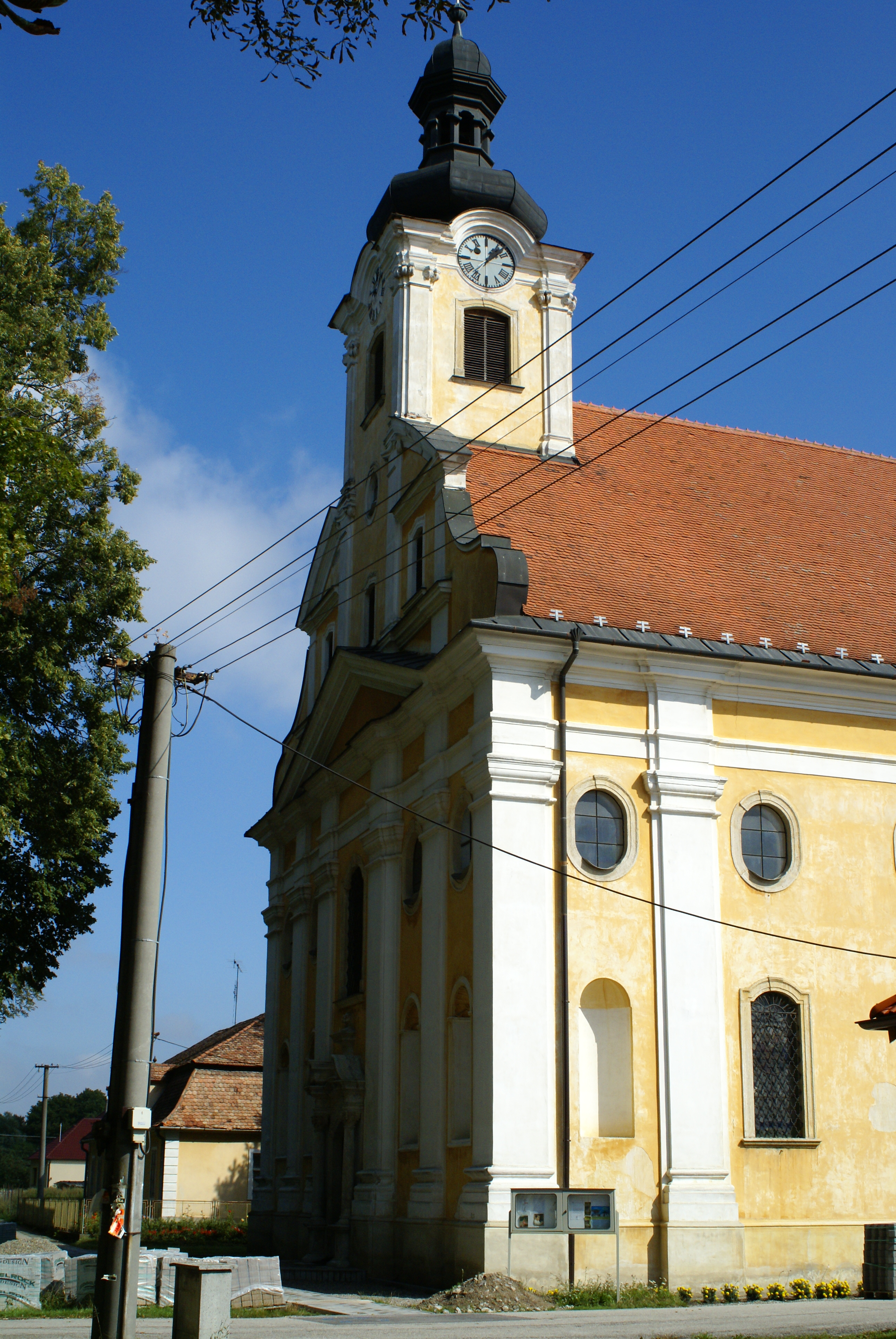 Jablonica, Slovakia